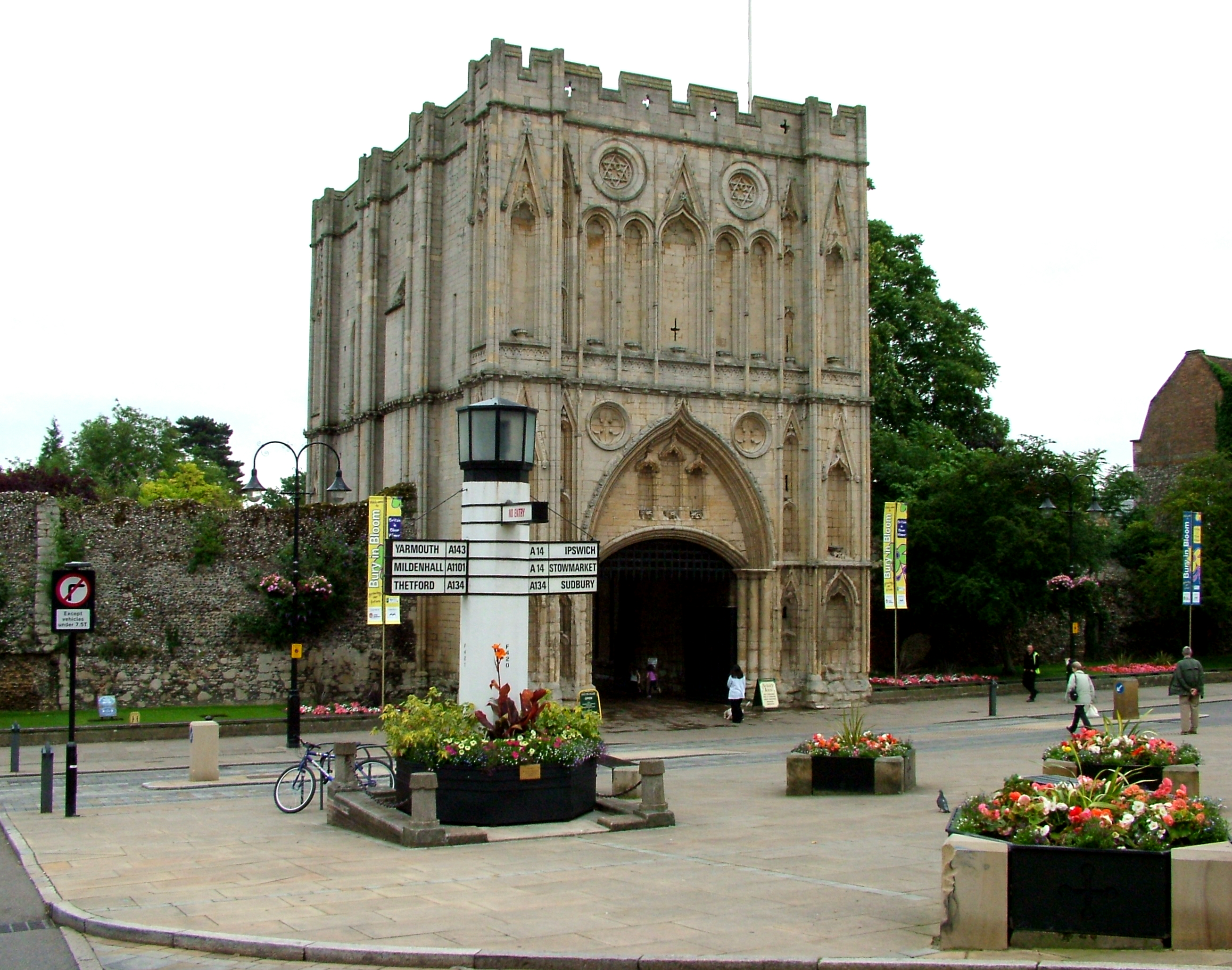 Abbey